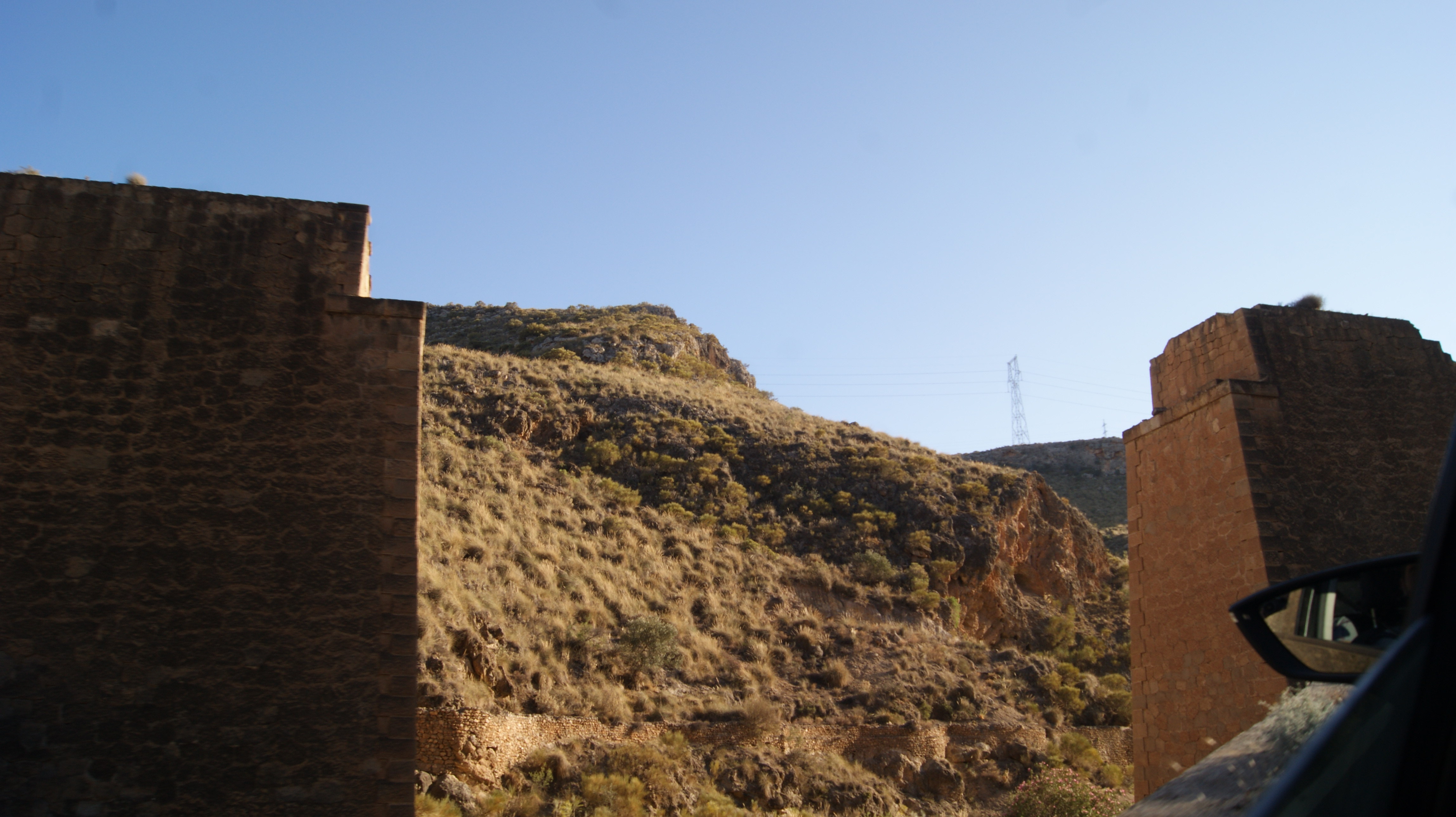 Puente en ruinas del antiguo ferrocarril de Lucainena, en Almería